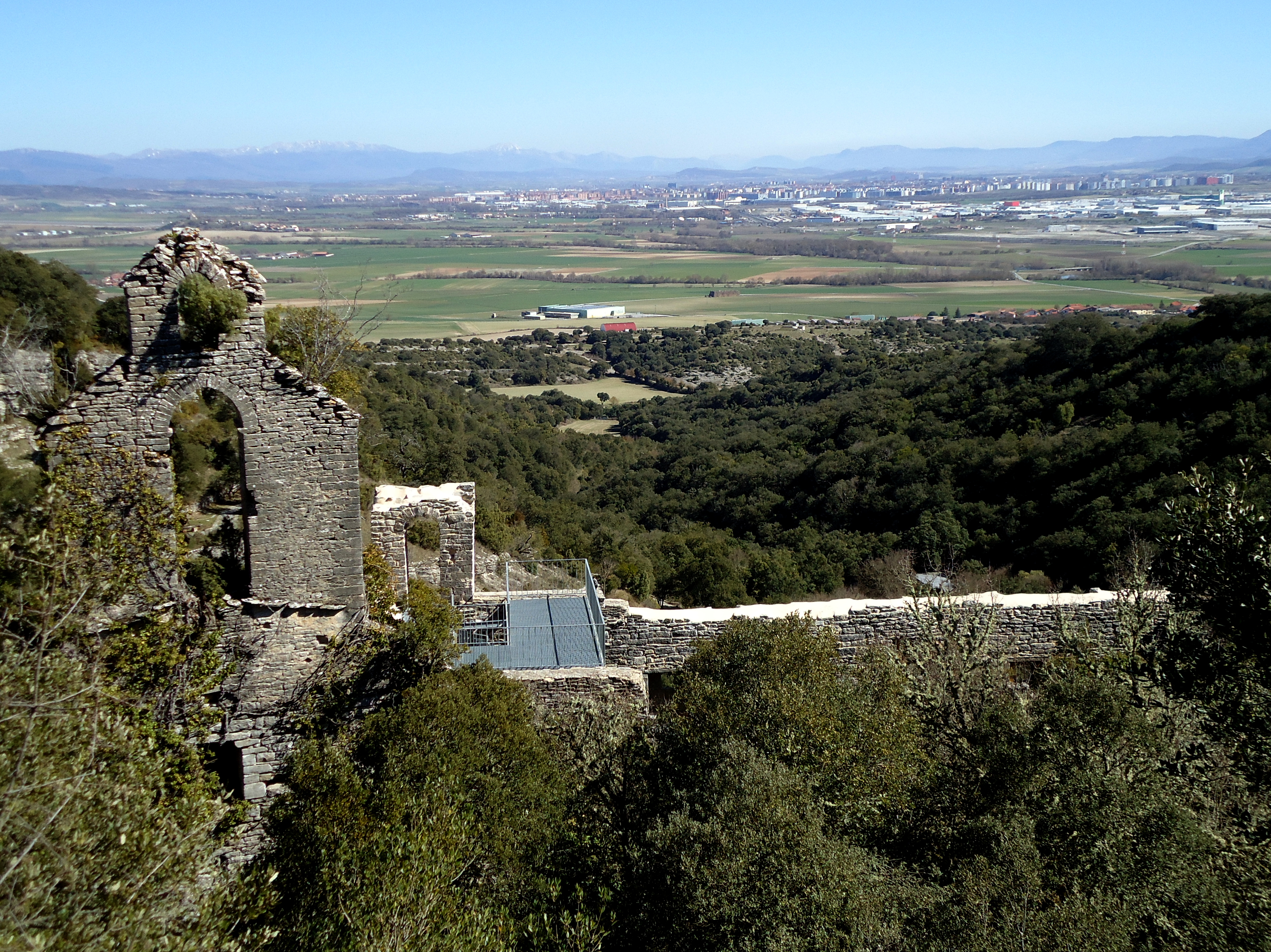 Santa Katalinako komentu zaharra (Tresponde) eta atzean Gasteiz